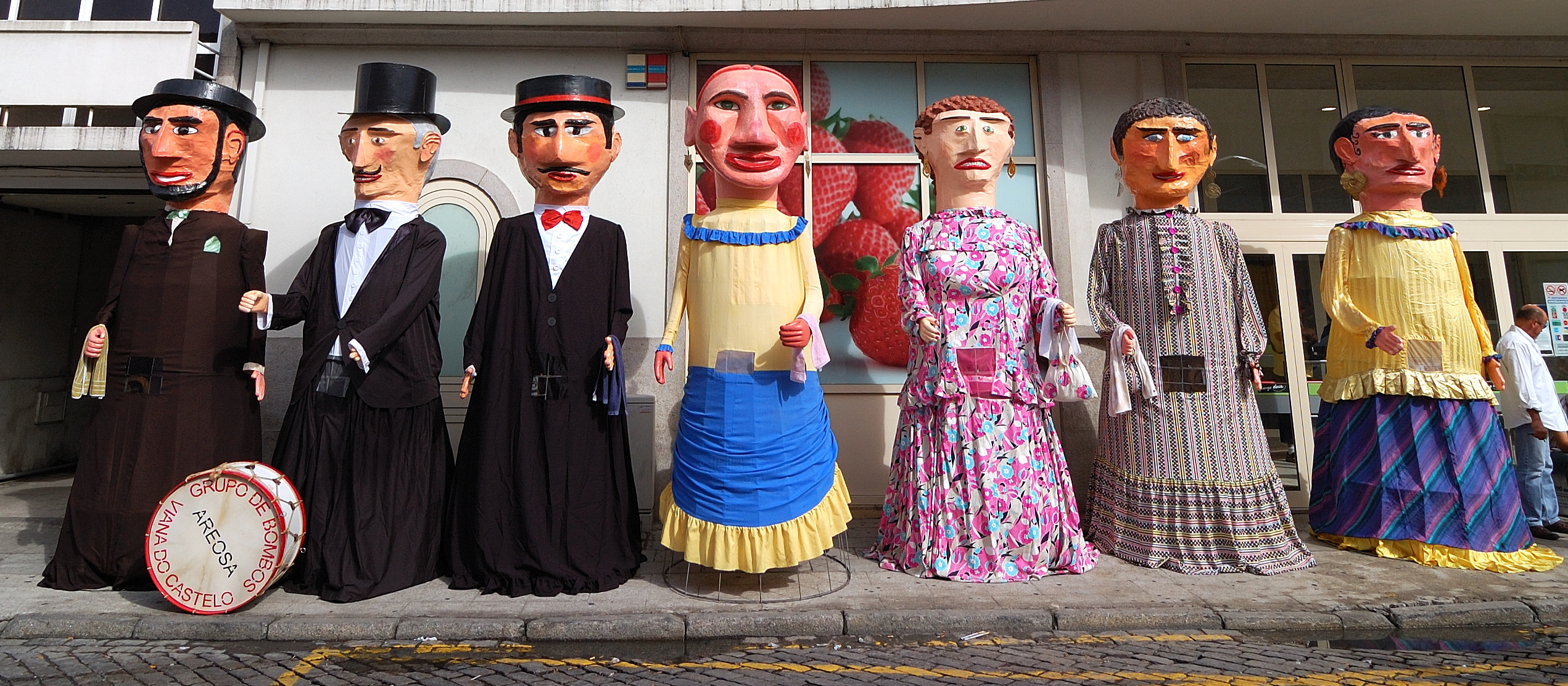 Viana do Castelo, Portugal [2010]